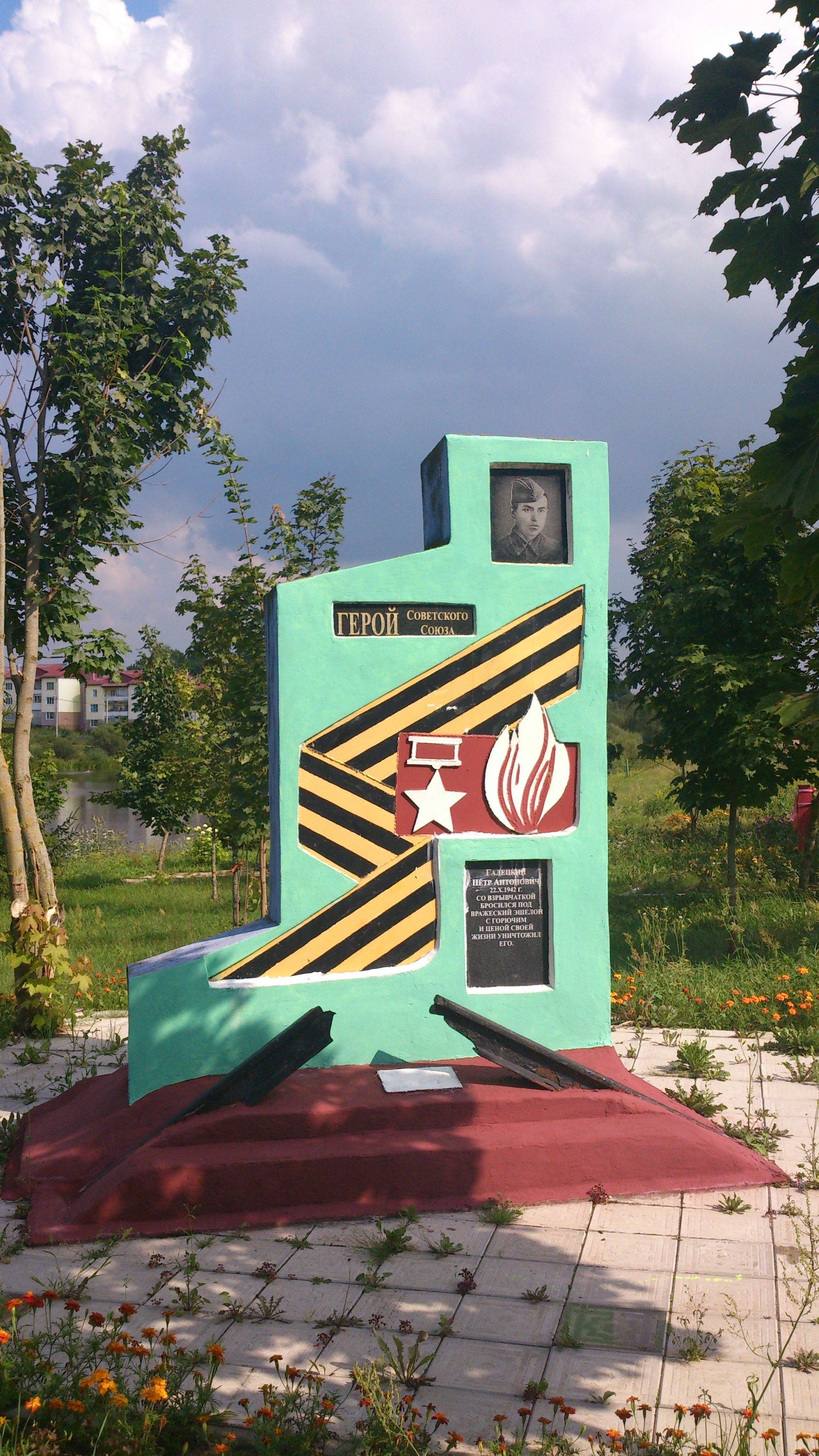 Памятник Герою Совесткого Союза Галецкому П.А. в агрогородке Копти